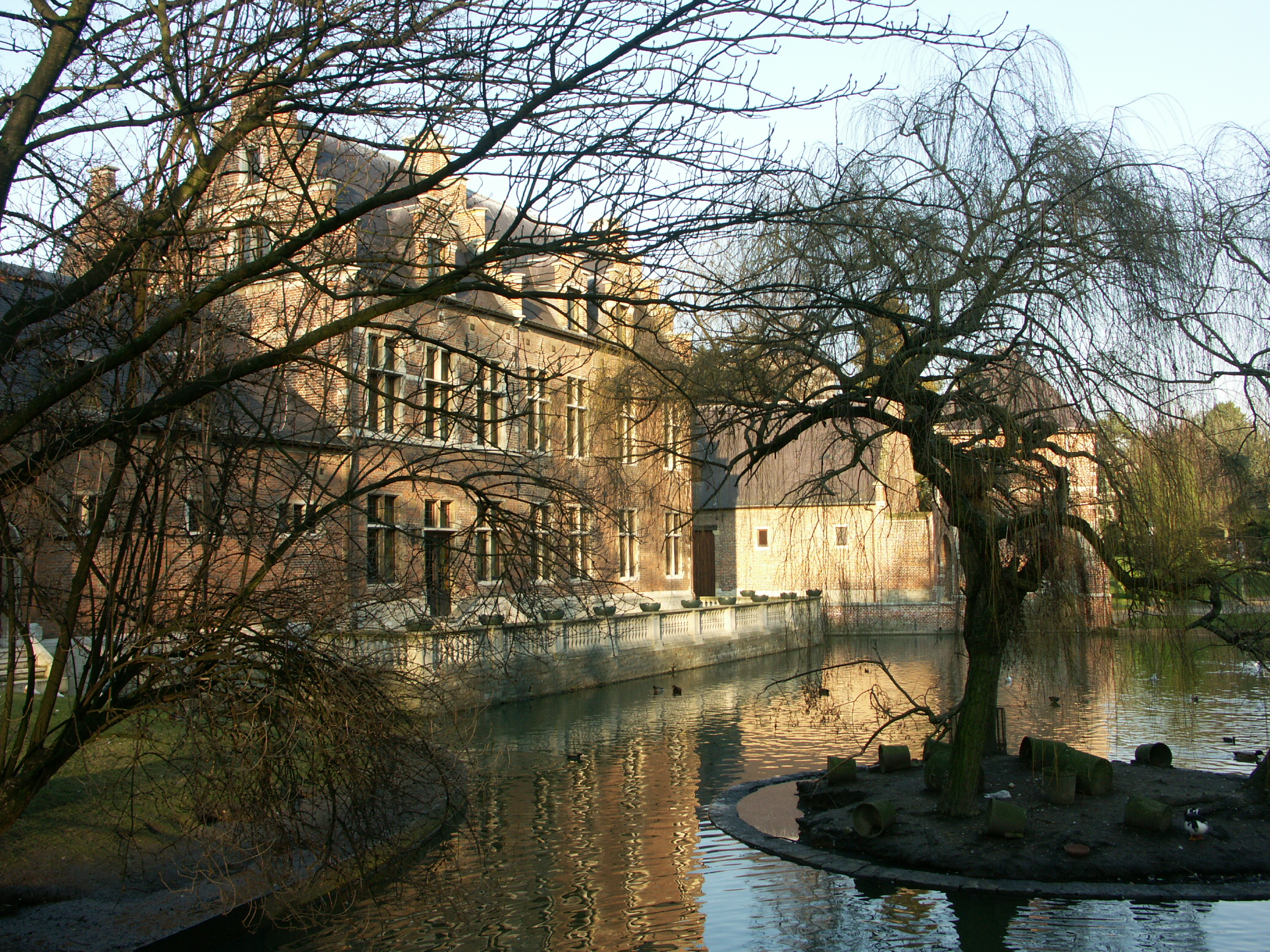 Château du Karreveld - Coeur du Festival Bruxellons!